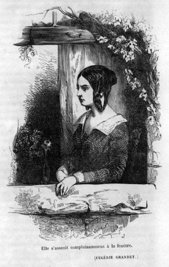 Eugénie Grandet (Honoré de Balzac - Eugénie Grandet)